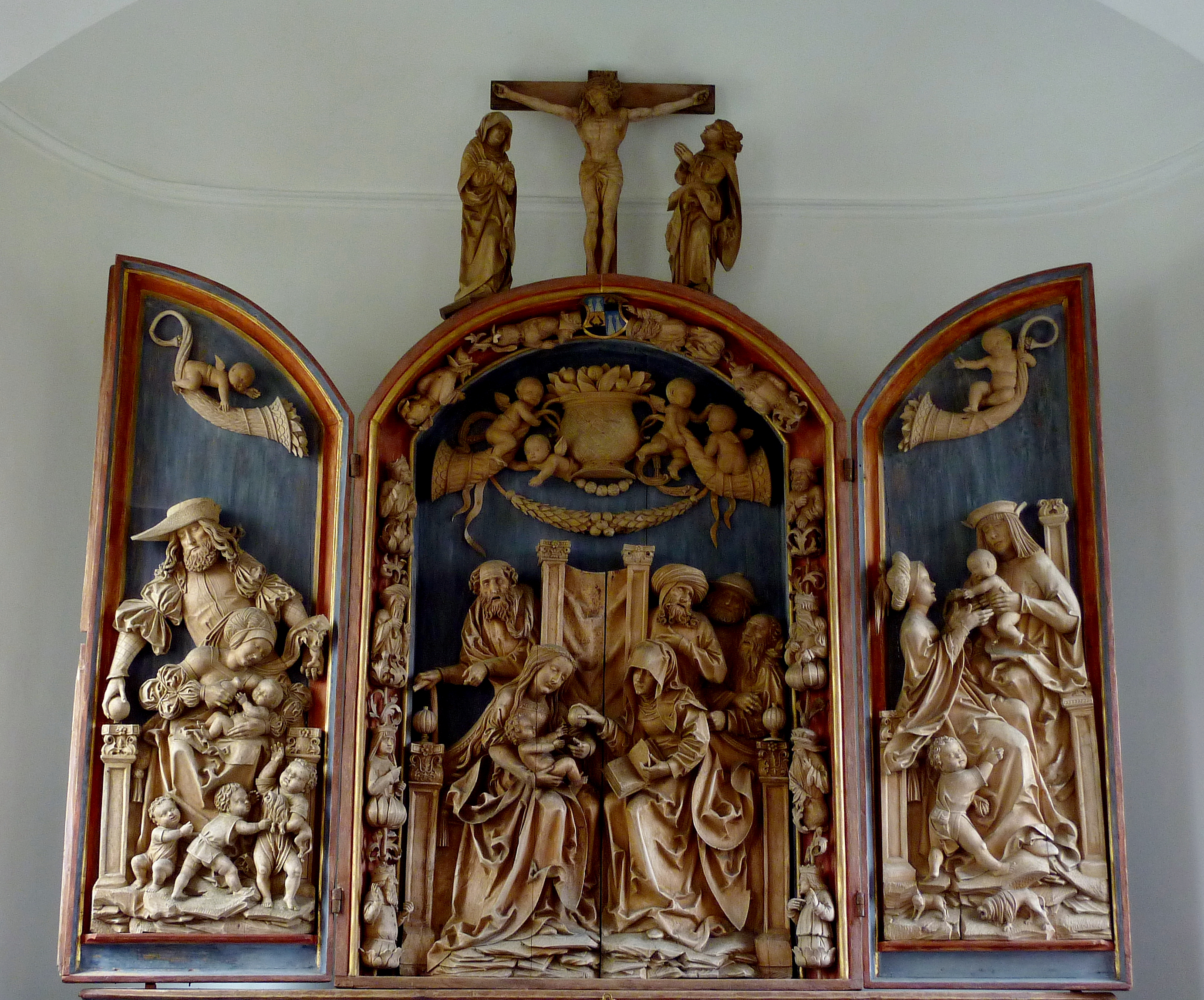 Altar mit der Darstellung der Heiligen Sippe in der katholischen Kapelle Franz Xaver in Bieselbach, einem Ortsteil von Horgau im Landkreis Augsburg; aus Lindenholz geschnitzt von dem Bildhauer Daniel Mauch, um 1510.